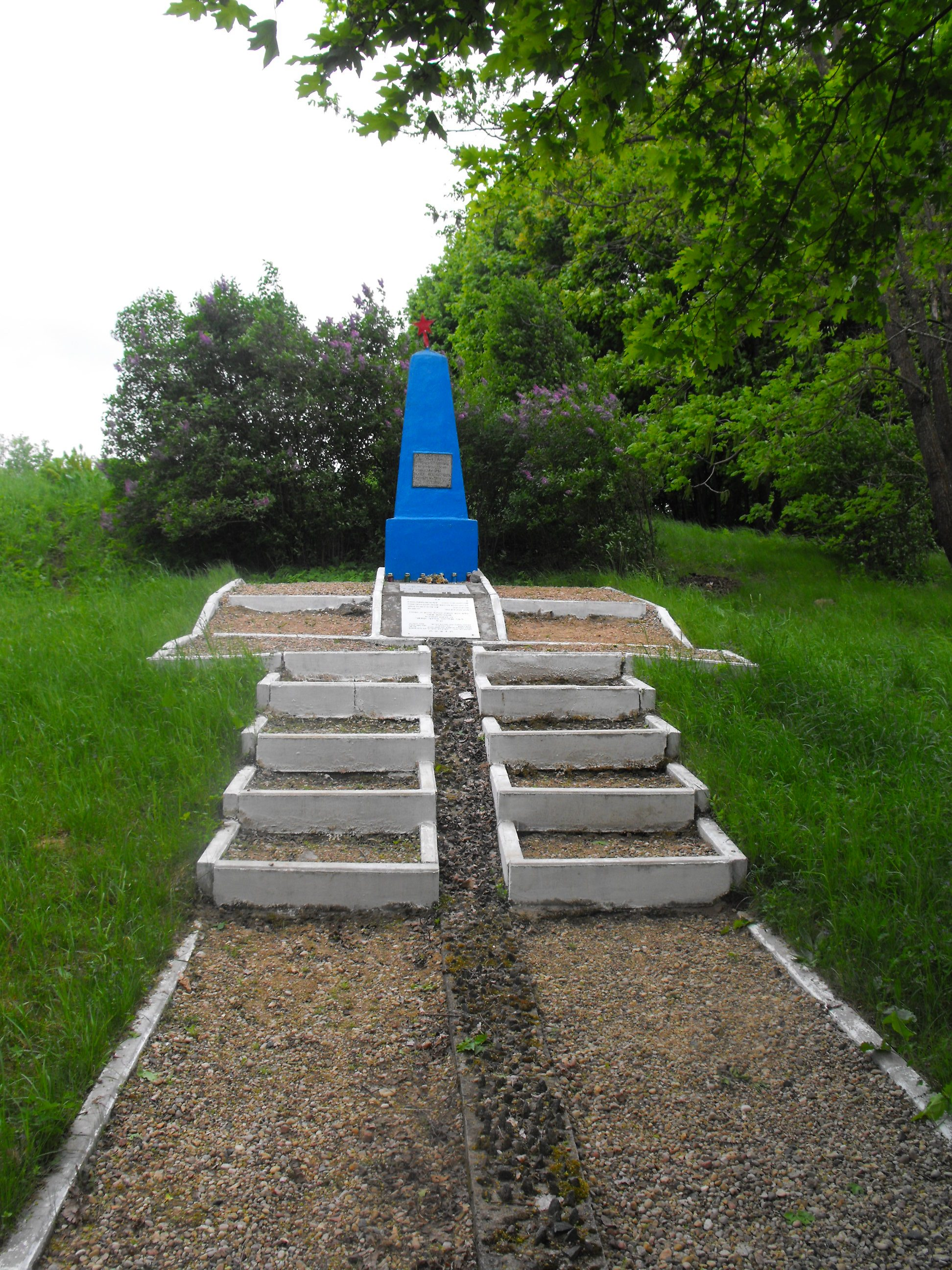 Мемориал на месте убийства нацистами 9 ноября 1941 года около 1600 евреев местечка Мир. Находится на улице Танкистов возле здания № 42 — ПТУ № 234. Установлен в 1966 году.